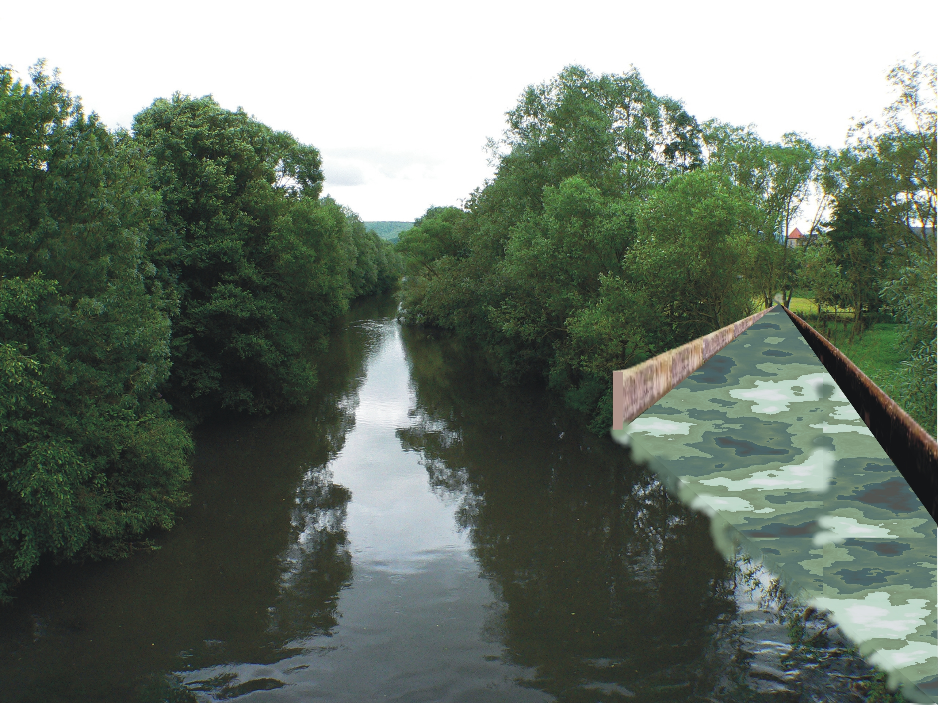 Main-Werra-Kanal (Deutschland): 1924-1961 geplante mögliche Einmündung des Kanals nördlich von Untermaßfeld in Höhe der alten Werrabrücke . Bau des Kanals wurde nie begonnen und 1961 verworfen. Landschaftsfoto real, Kanalverlauf montiert.